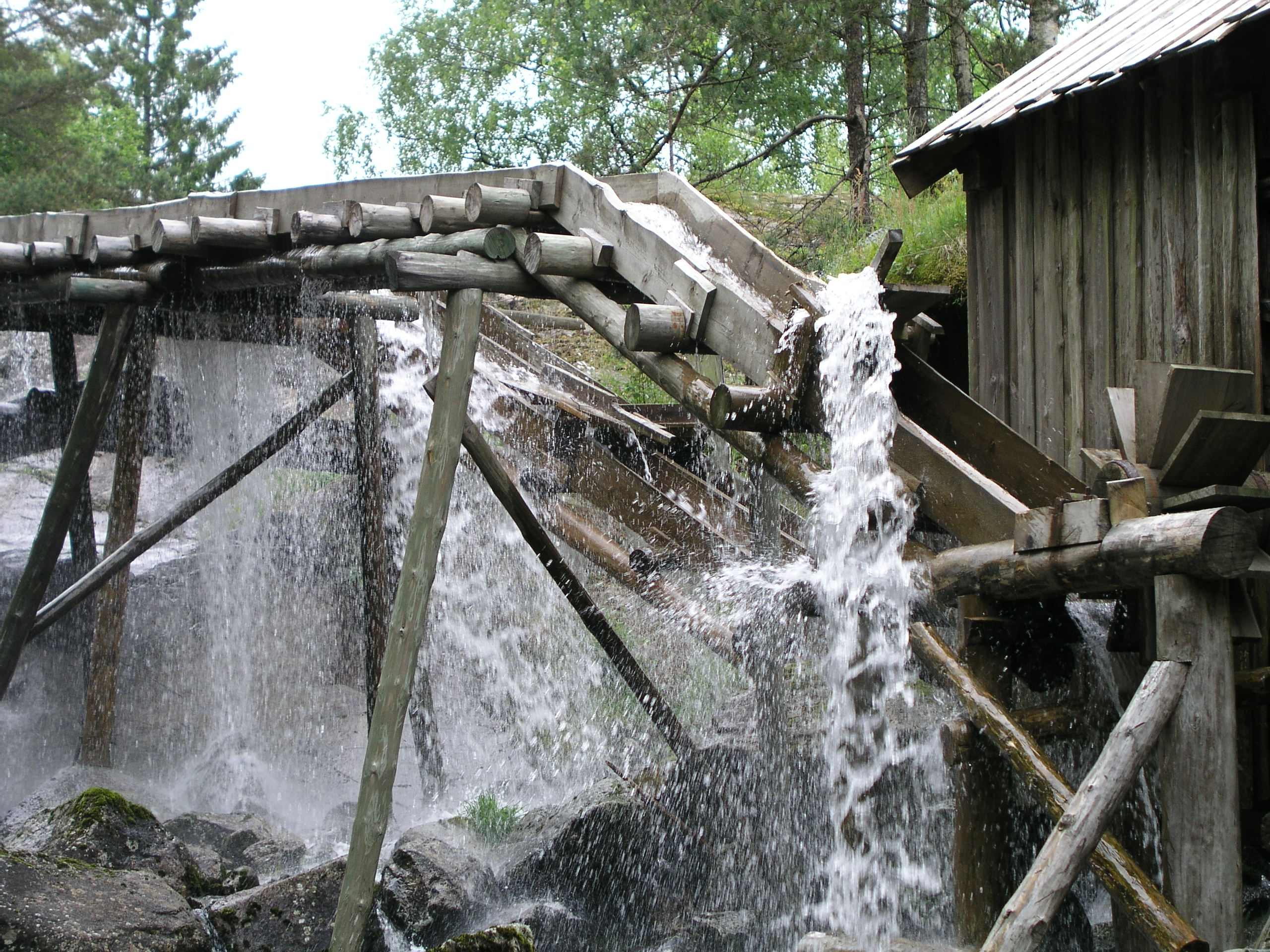 Norsk (nynorsk): I Kvednahola i Suldal er det kvernhus, tørke og sag. Tilhøyrer Ryfylkemuseet.